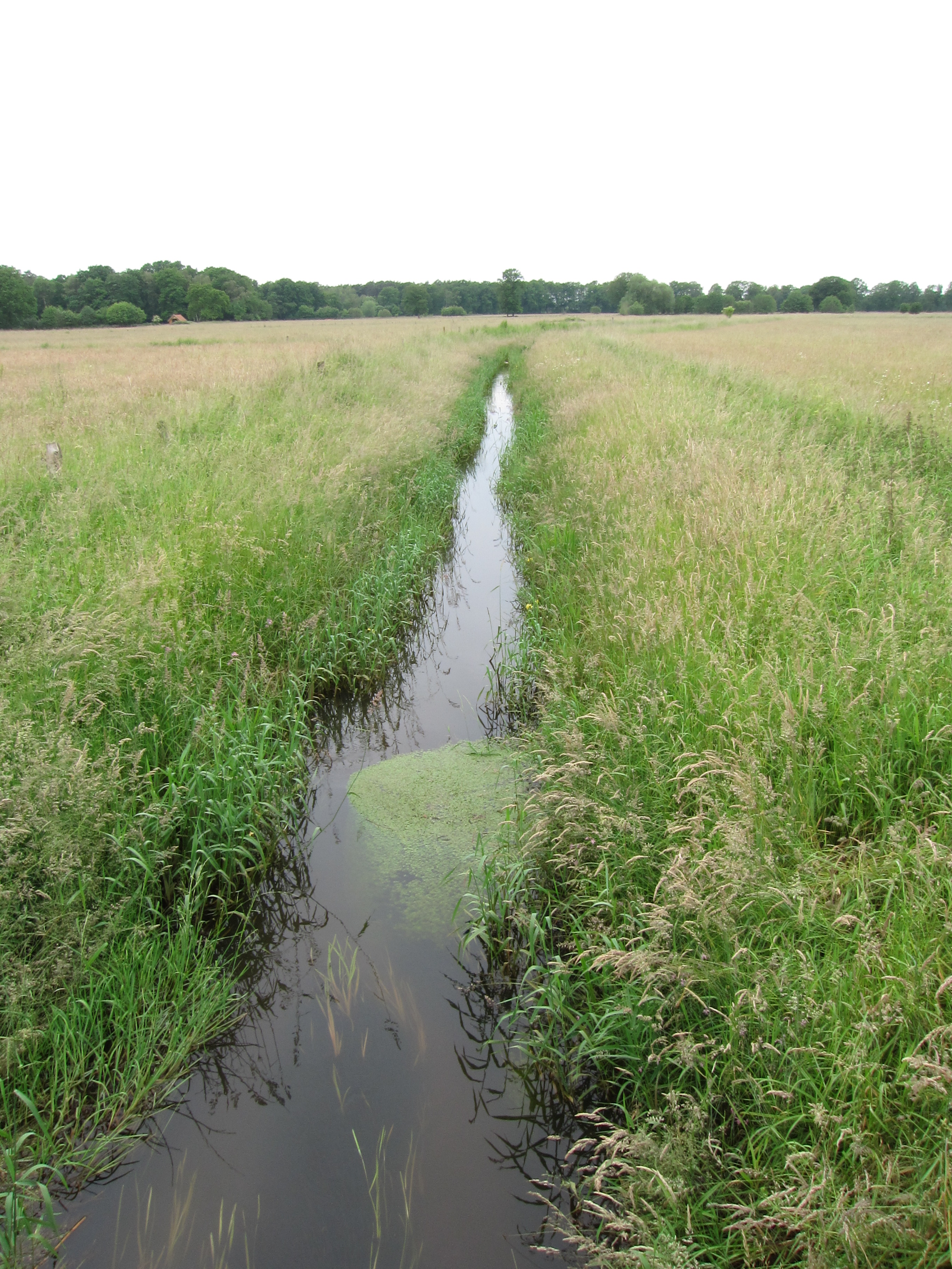 Naturschutzgebiet „Haverforths Wiesen und Grützemachers Kanälchen“ (NSG ST-031), Grützemachers Kanälchen, Blick vom Saerbecker Damm